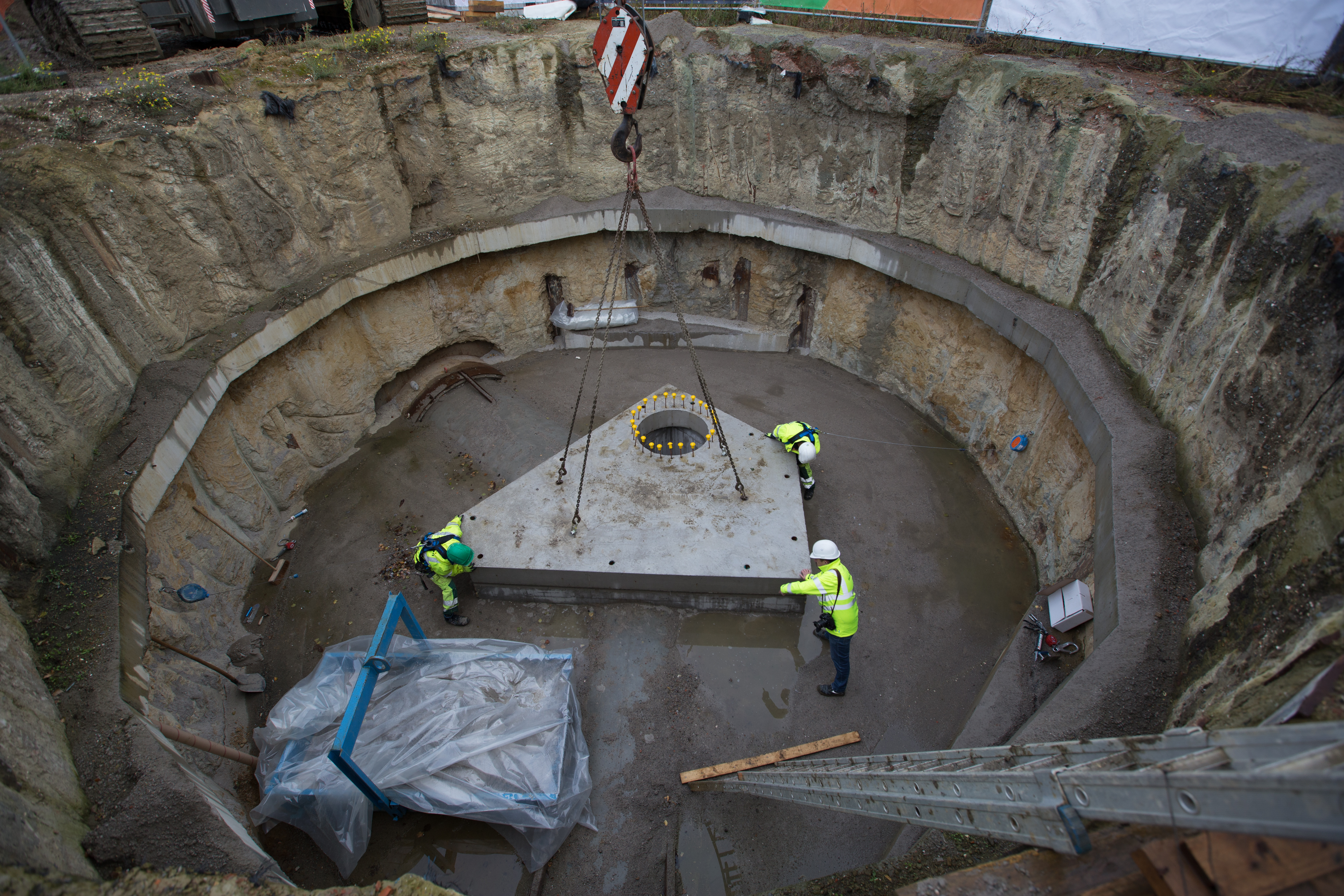 Plaatsing van een dekplaat van een inspectieput in de rioleringswerken op THV Schijnpoort. De plaat bestaat is de eerste toepassing van zelfhelend beton in België. Ze is ontwikkeld door de Universiteit Gent.